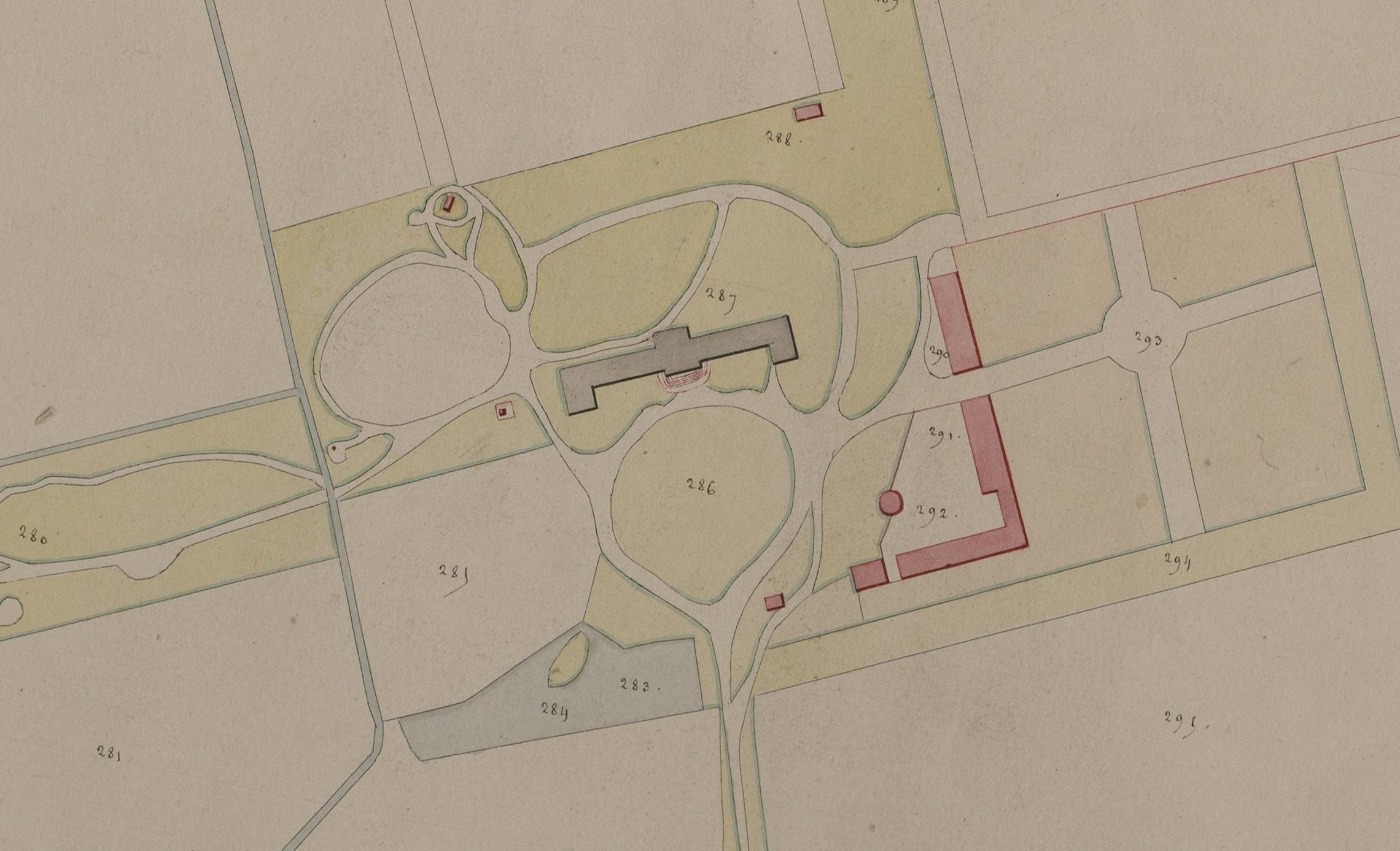 Aubevoye - Gros plan sur la chartreuse en 1829-2